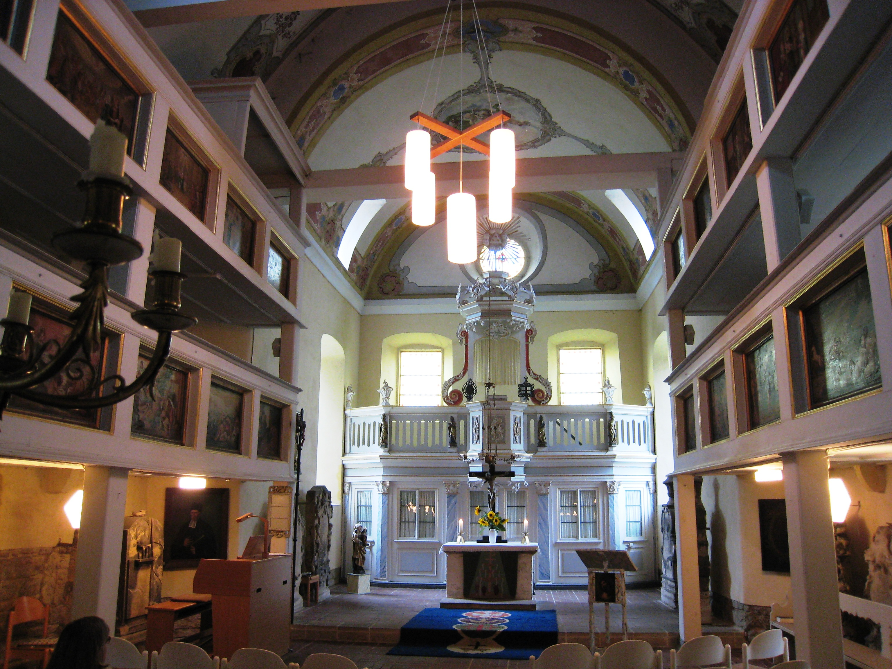 Wigbert-Kirche(Sülzenbrücken)